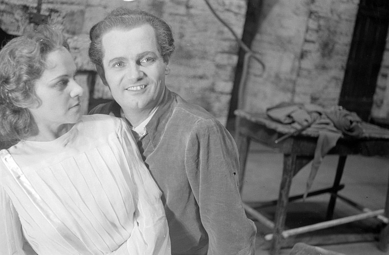 Original image description from the Deutsche Fotothek Szenenbilder mit Josef Burgwinkel in der Titelrolle, Tiana Lemnitz als Gilda, Carola Goerlich als Maddalena und Peter Anders als Graf von Mantua